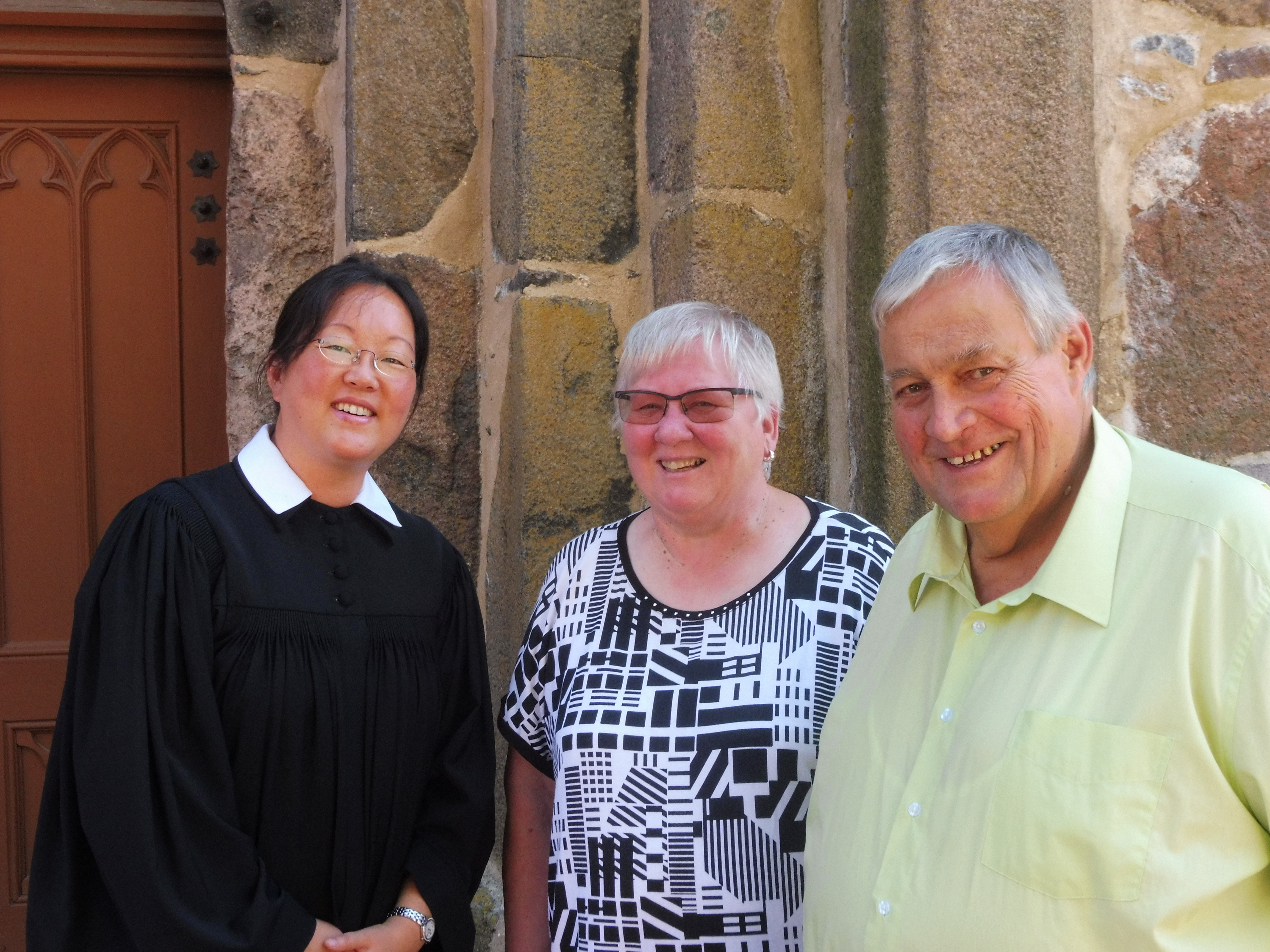 Hannah Poppe, Karin Jarchow, Hans-Heinrich Jarchow vor der Plauer Marienkirche